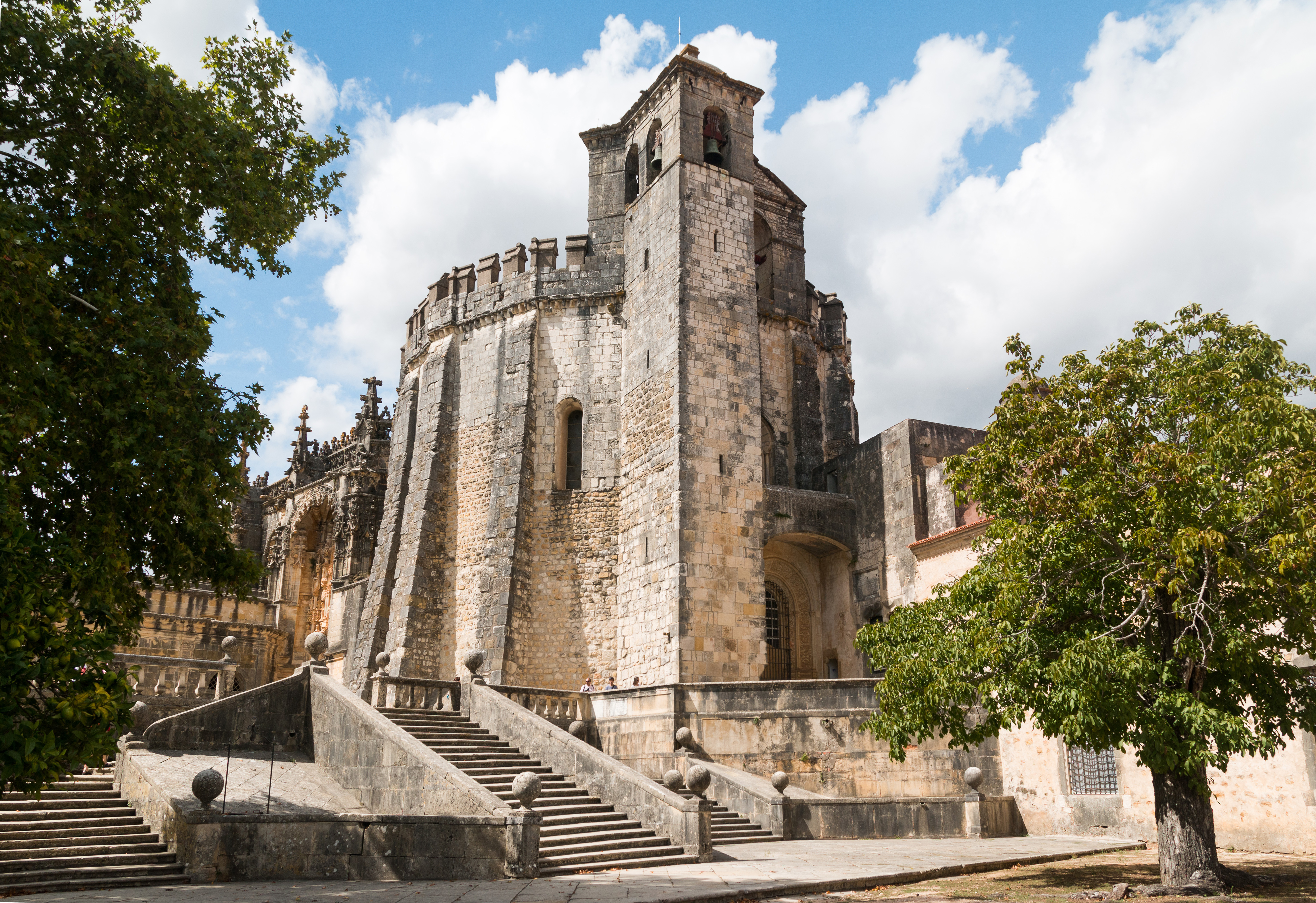 Templar rotunda.